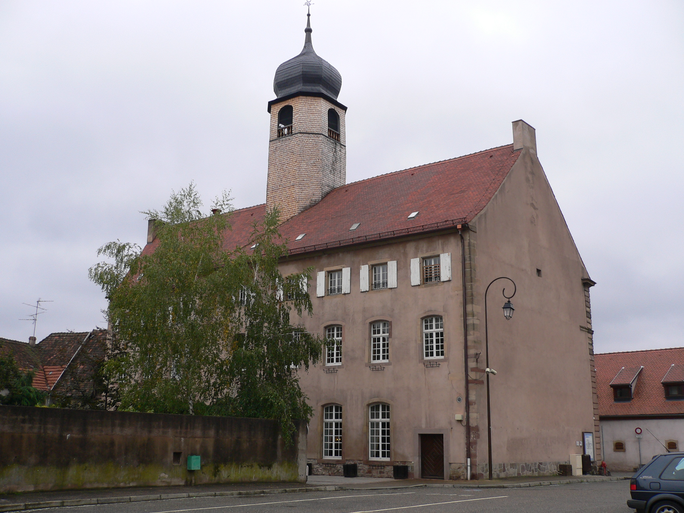 Mairie de Mutzig vu depuis le parking et à l'arrière de l'entrée principale